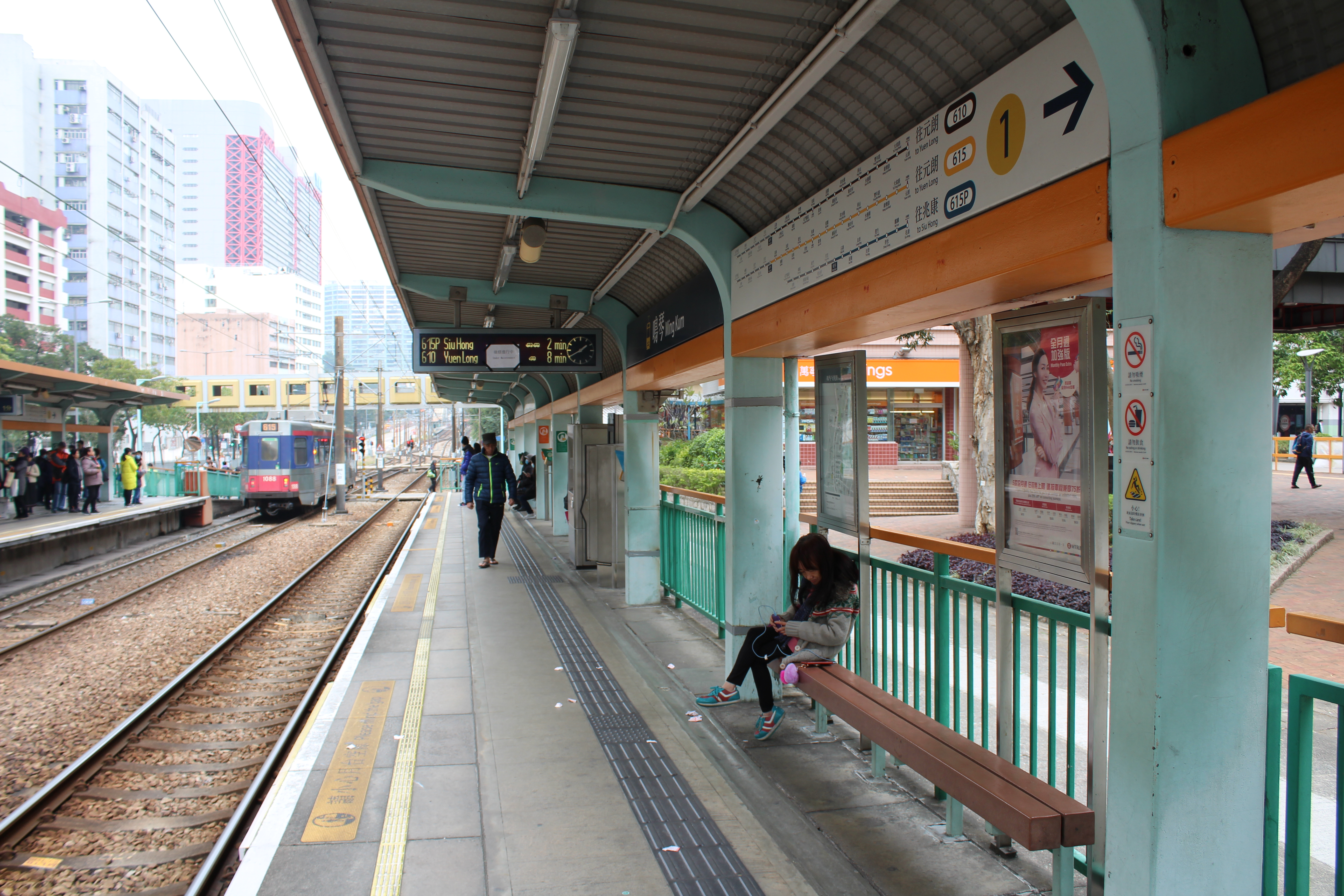 鳴琴站1號月台